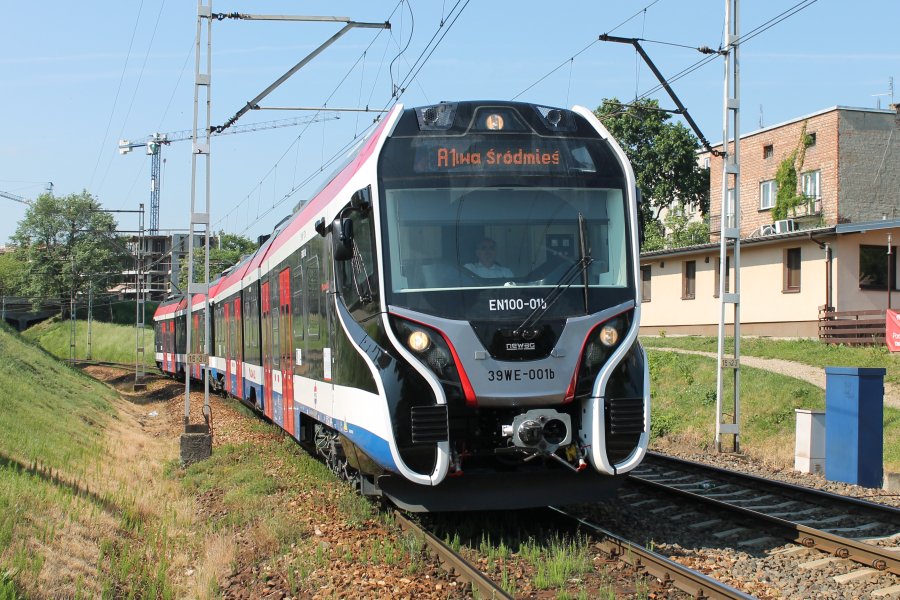 Elektryczny zespół trakcyjny EN100-01 wjeżdża na przystanek Pruszków WKD od strony stacji Komorów.